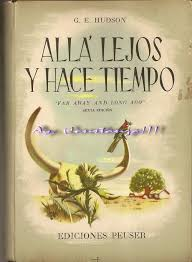 Portada del libro Allá ljos y hace tiempo publicado en 1918